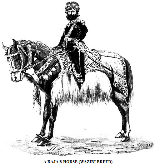 Cheval de race Waziri par John Lockwood Kipling